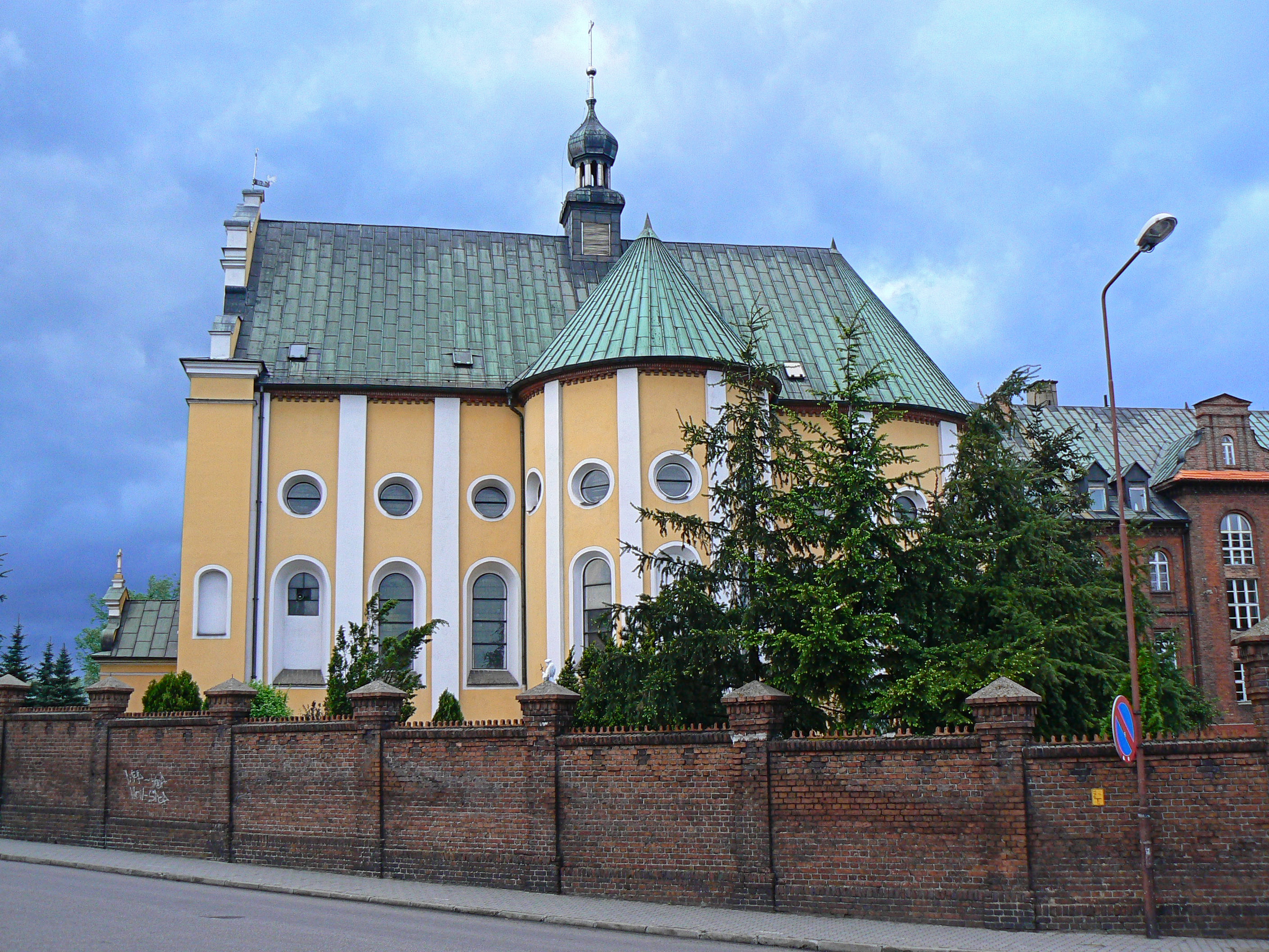 Kościół klasztorny oo. Franciszkanów - widok z boku